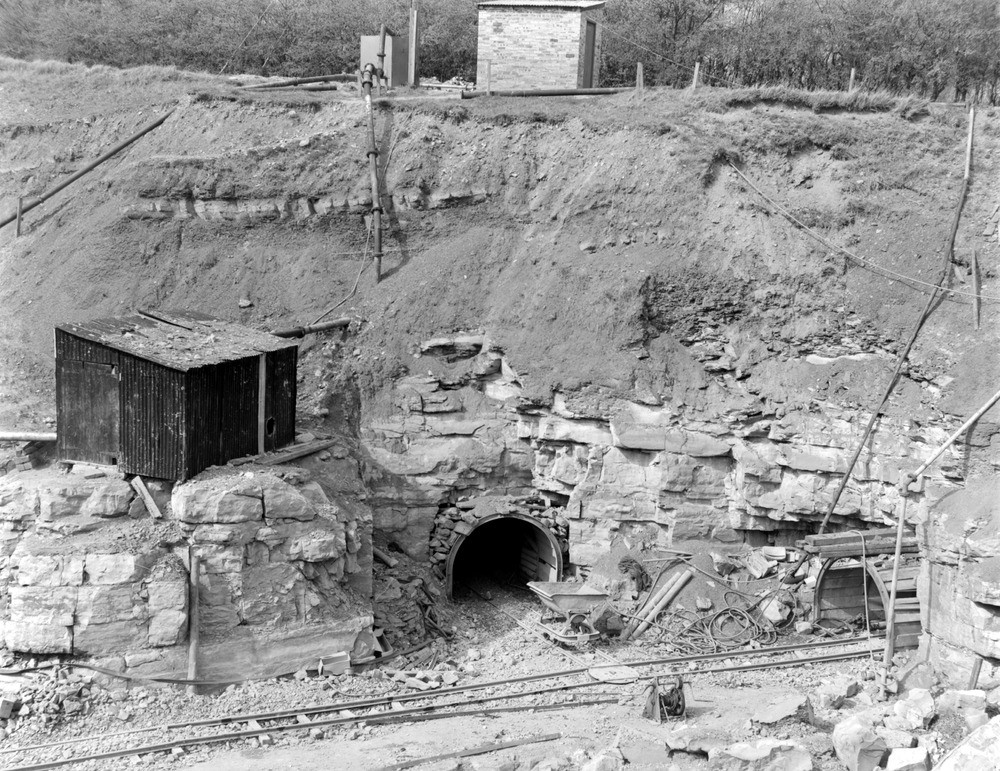 Darnley Quarry, 9.7 km south-west of Glasgow, Renfrewshire